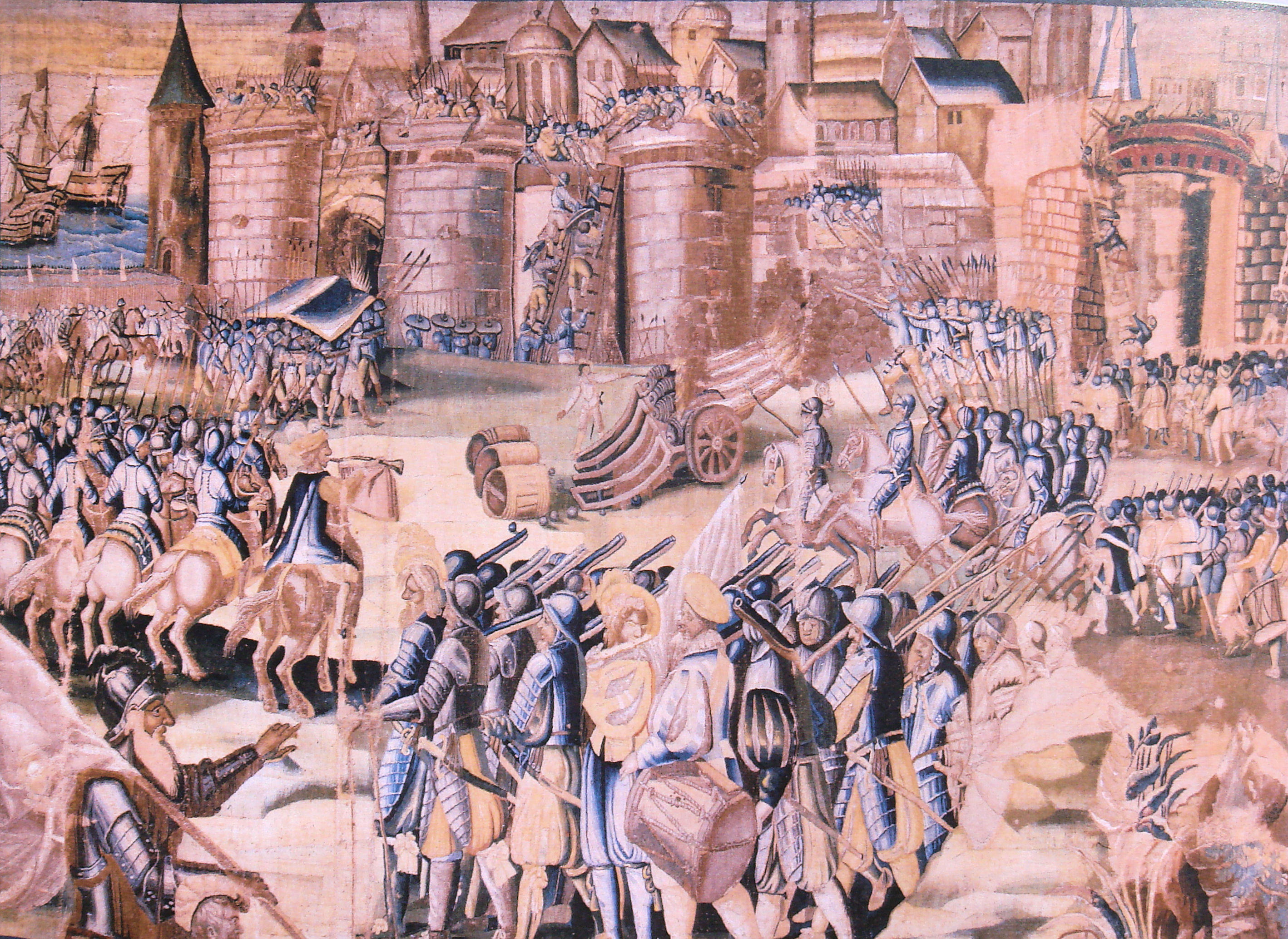 Le_Siège_de_La_Rochelle_par_le_Duc_d_Anjou_en_1573